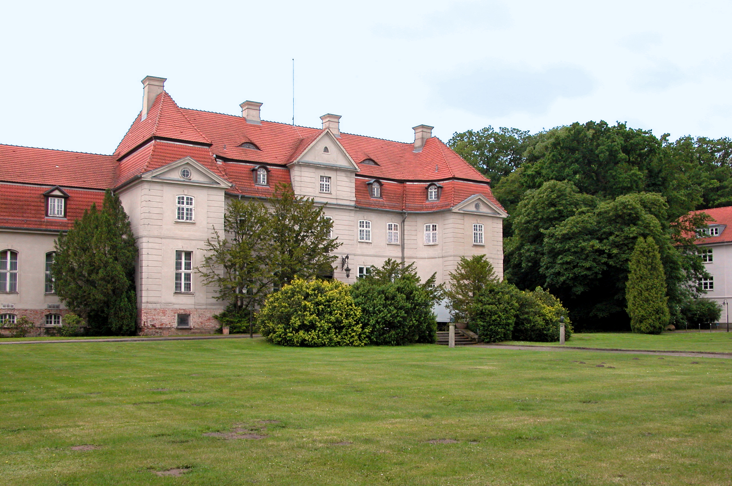 25.06.2004 17495 Karlsburg, Nepziner Weg / Greisfswalder Straße (GMP: 53.970552,13.610214): Barockschloß (1732). Bis 1945 im Besitz der Adelsfamilie von Bismarck-Bohlen und anschließend in der DDR bis 1990 Teil des in Karlsburg ansässigen Zentralinstitutes für Diabetes. Seitdem gehört es dem Land Mecklenburg-Vorpommern und wird durch die Universität Greifswald verwaltet. Hier befinden sich Institute und ein privates Klinikum. Hofseite. [DSCN4155.JPG]20040625090DR.JPG(c)Blobelt